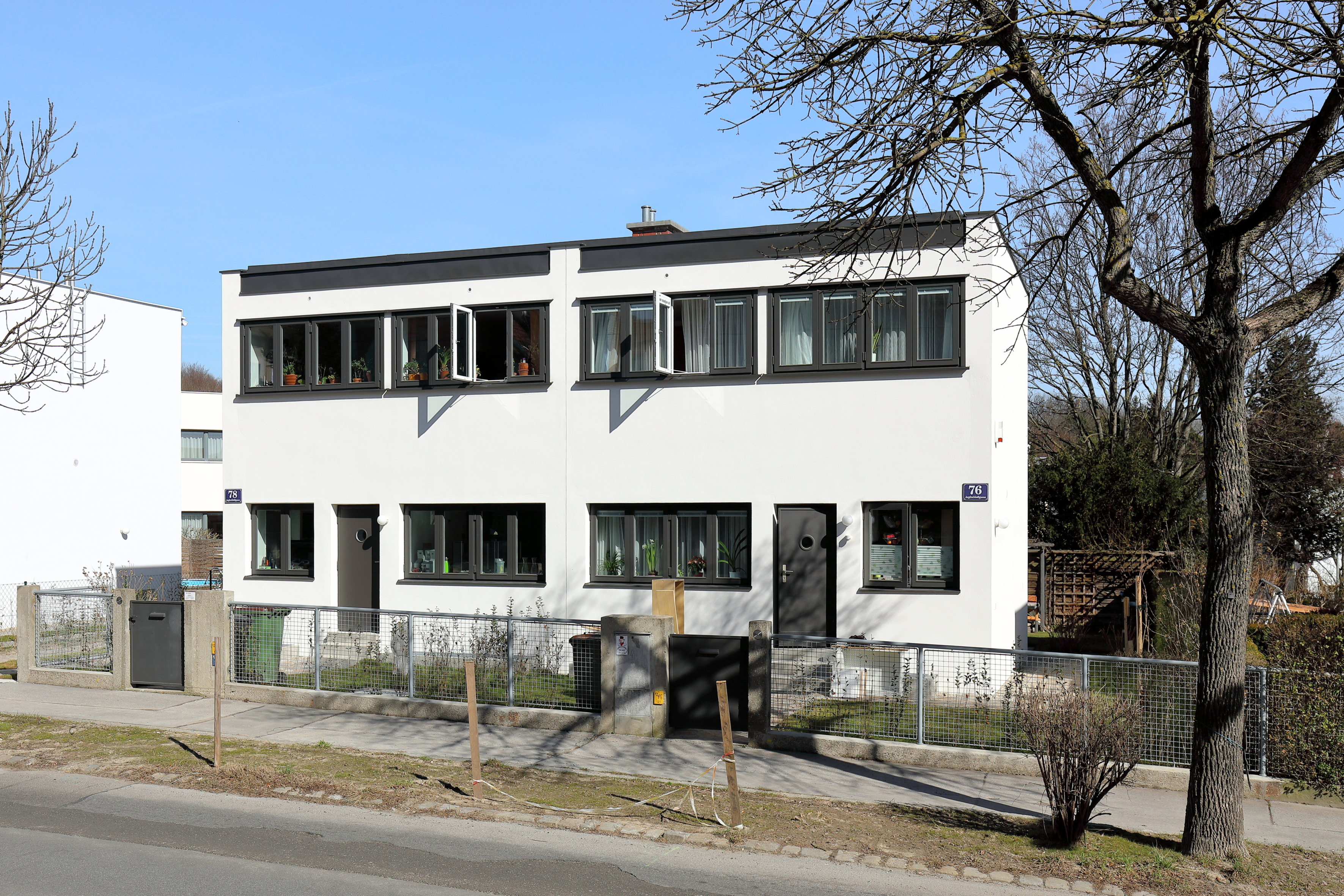 Das Doppelwohnhaus Jagdschloßgasse 76, 78 der Werkbundsiedlung Wien im 13. Wiener Gemeindebezirk Hietzing.Errichtet wurden das Doppelwohnhaus um 1930 nach Plänen des Architekten Josef Franz Dex. Es ist ein Teil einer Mustersiedlung von etwa 70 Häusern mit rund 50 verschiedenen Haustypen, die von 1929 bis 1932 gebaut wurden. An der Planung der einzelnen Häuser beteiligten sich über 30 Architekten. This media shows the Vienna residential building (Gemeindebau) with the ID 61.